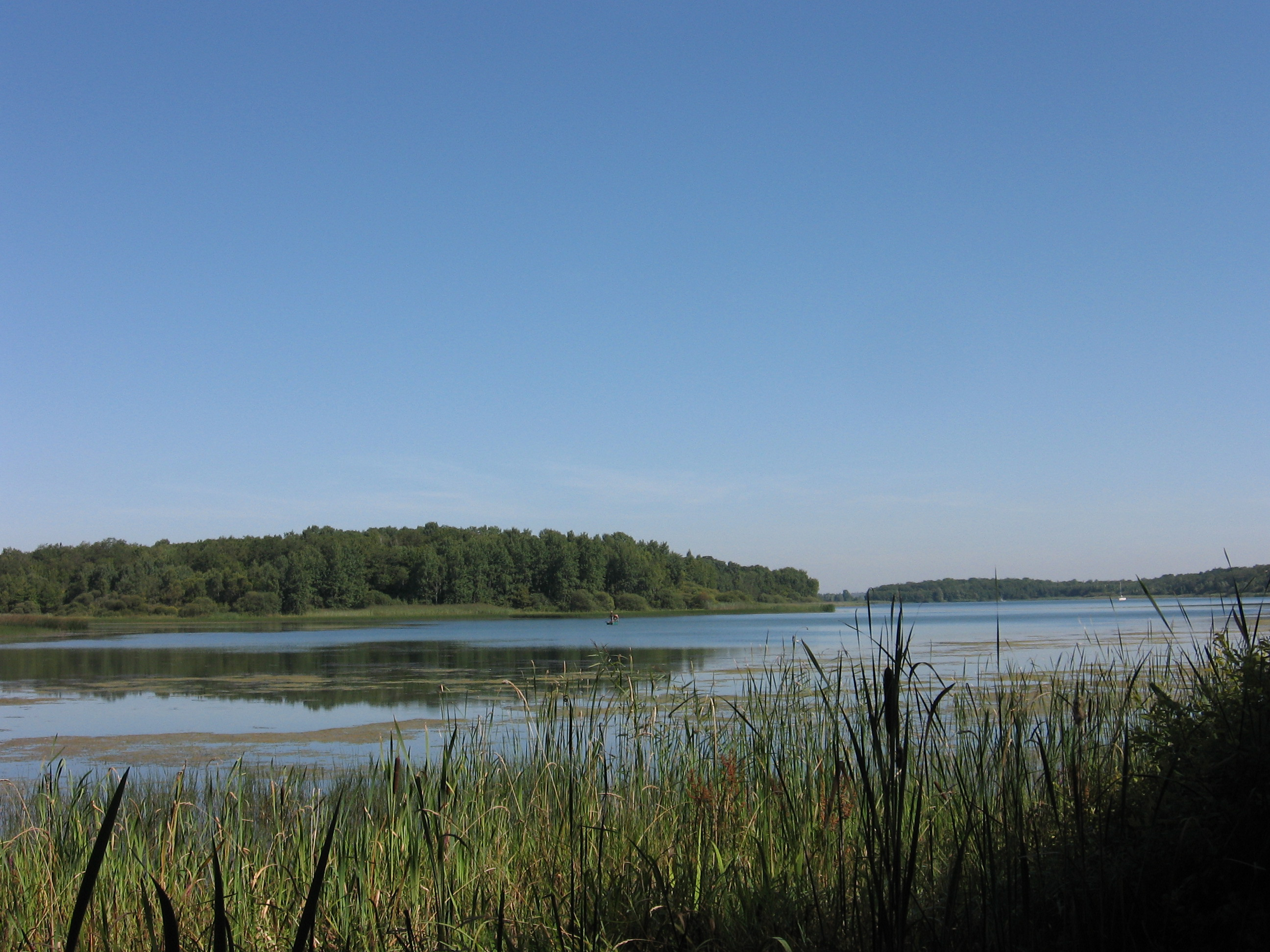 Lac de Madine